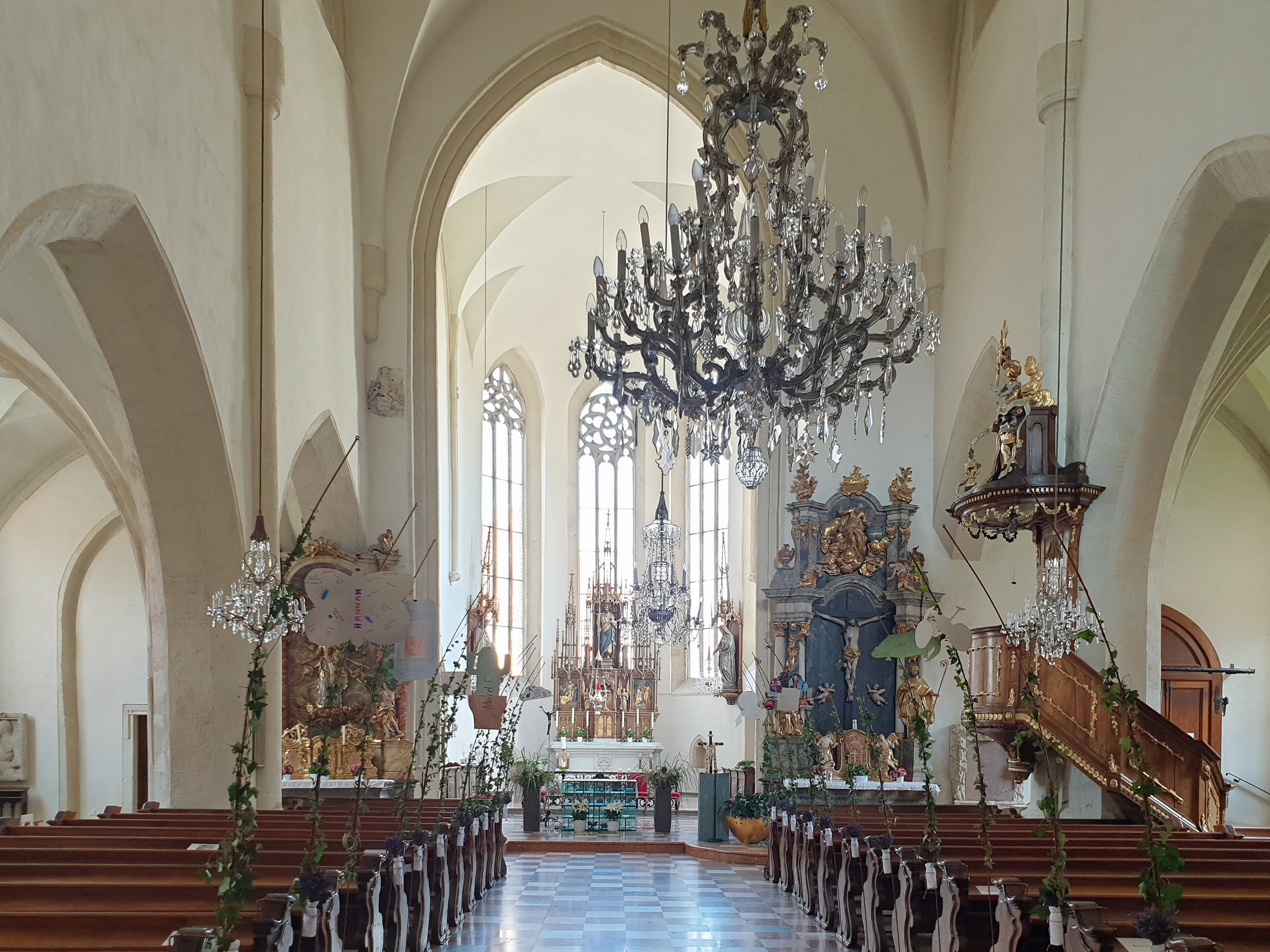 Innenraum der Stadtpfarrkirche in Bad Radkersburg.